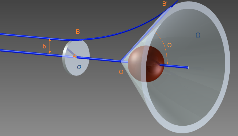 פיזור: חתך פעולה